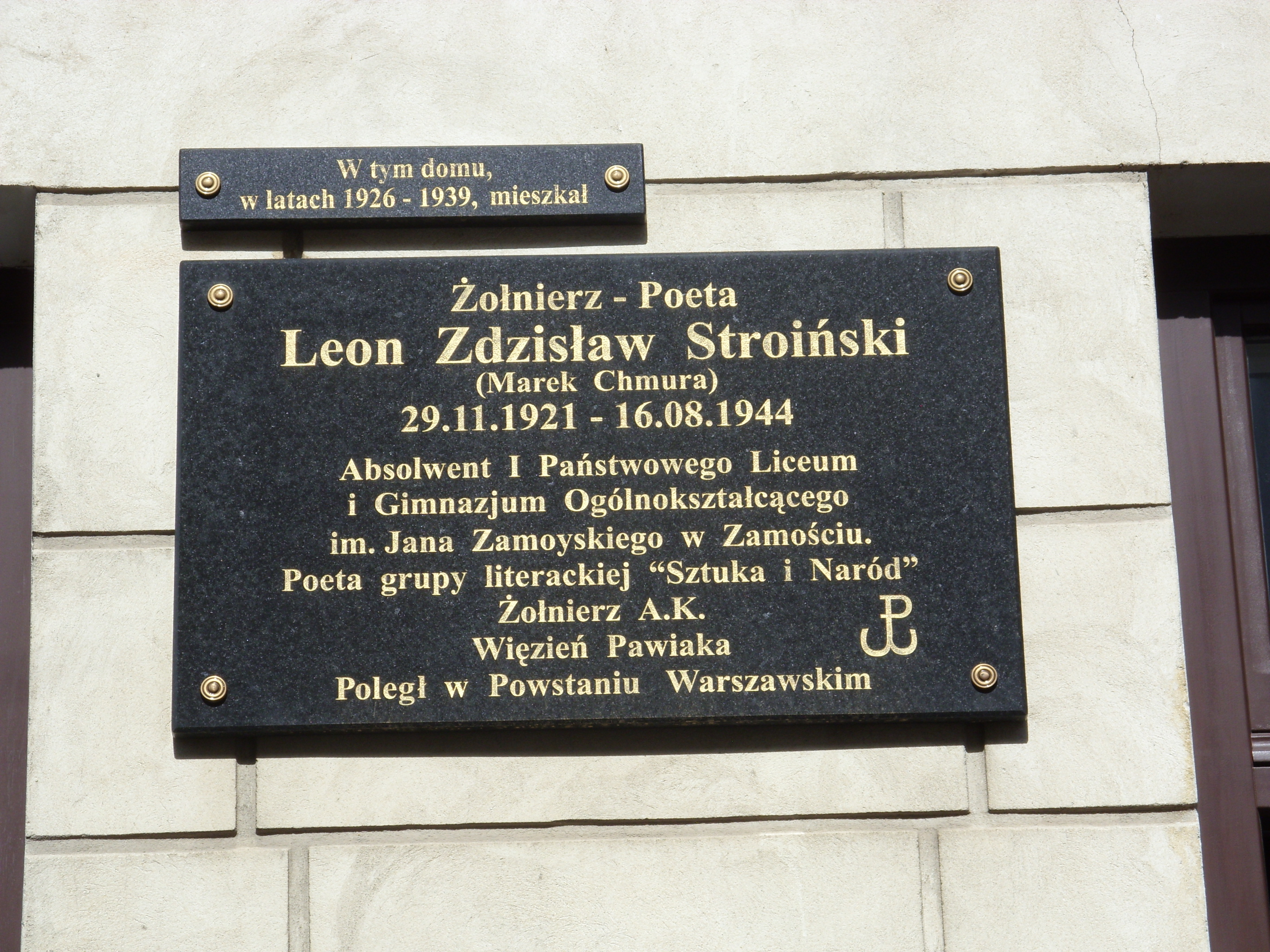 Leon Zdzisław Stroiński. Poeta. Powstaniec Warszawski. Tablica w Zamościu ul. Kościuszki 8